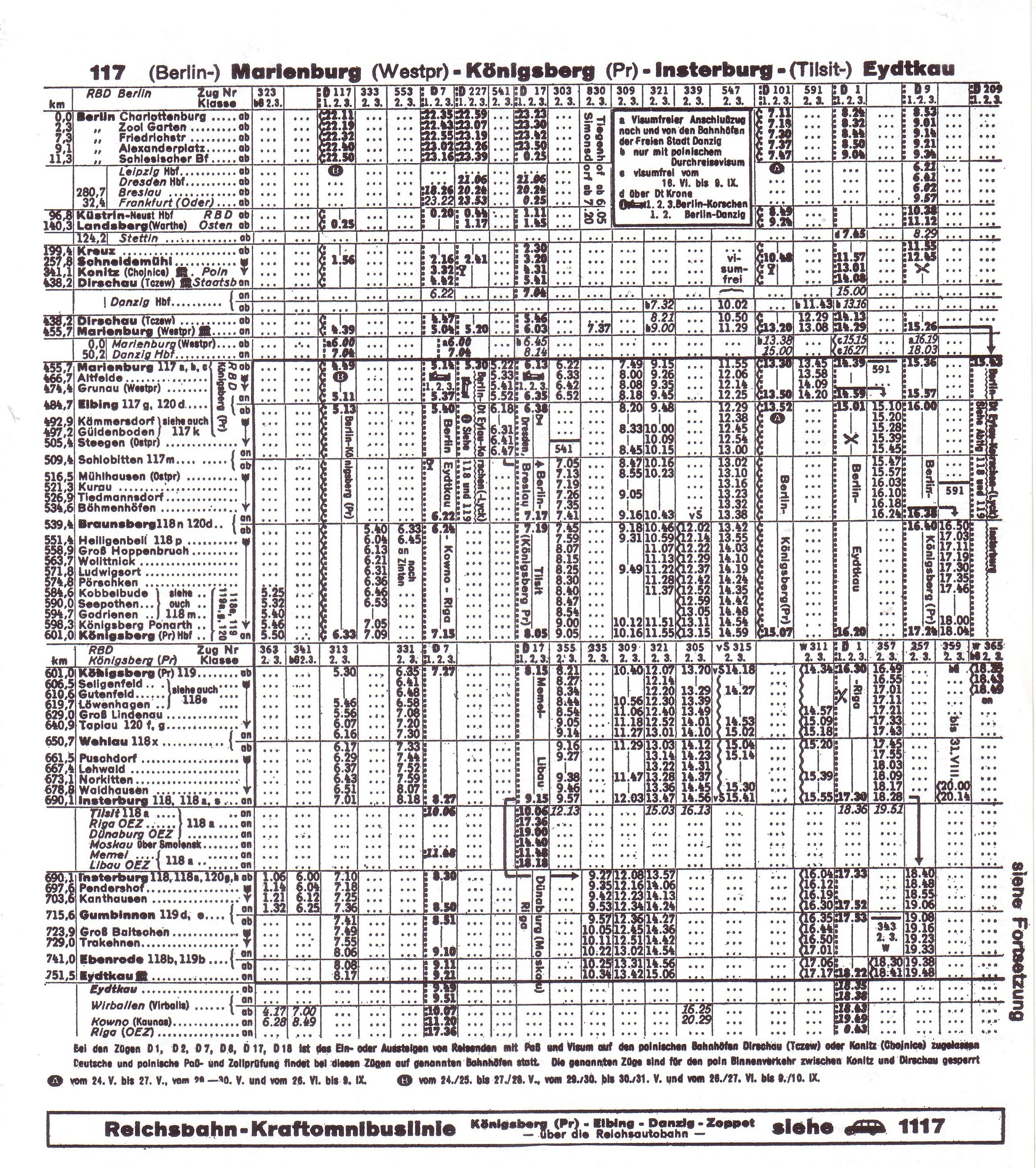 Fahrplan der Deutschen Reichsbahn von Berlin und Marienburg nach Königsberg, Insterburg (-Tilsit) und Eydtkau (Eydtkuhnen)